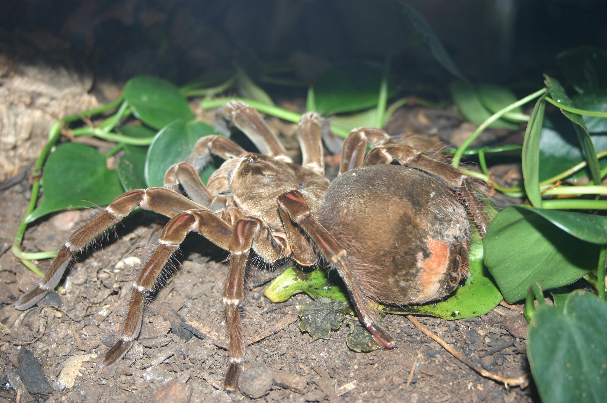 Góliát madárpók